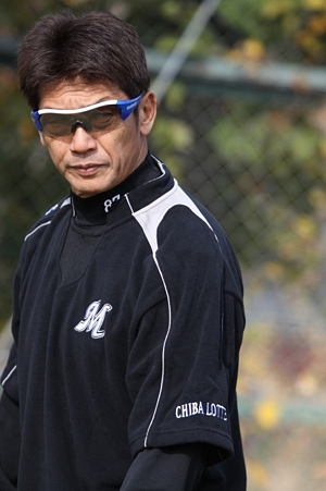 日本プロ野球 千葉ロッテマリーンズ 高橋慶彦コーチ